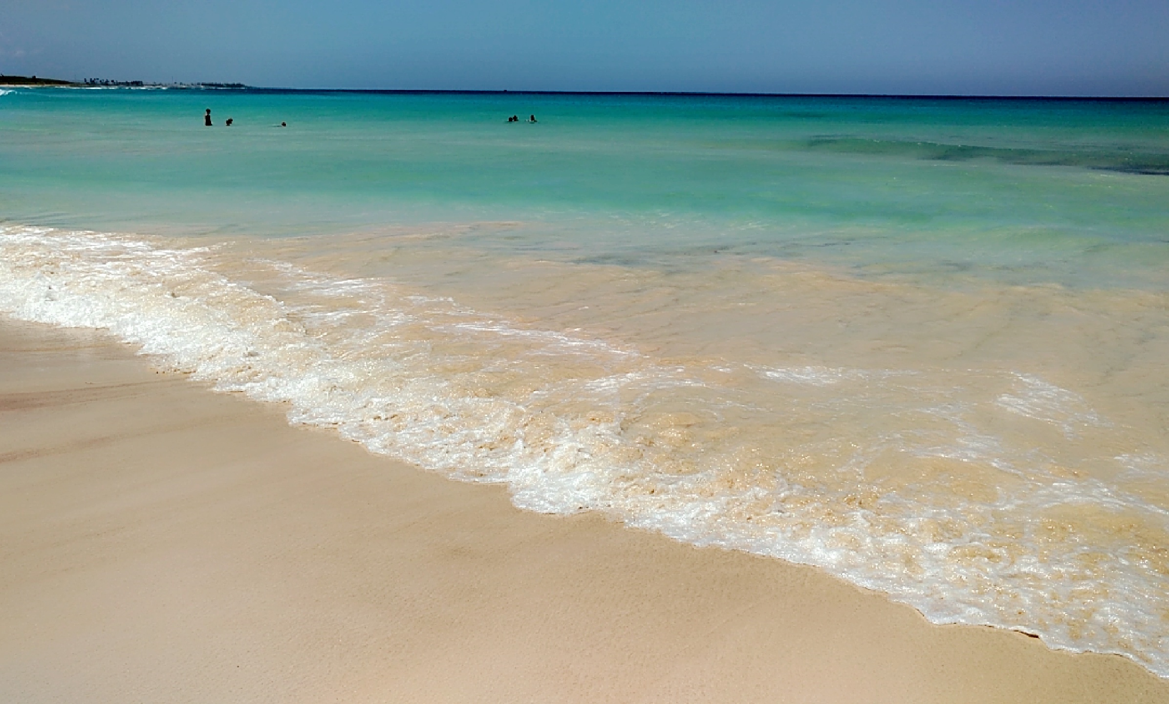 Playa Macao en la región este de la República Dominicana